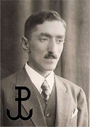 Zdjęcie z okresu okupacji niemieckiej - 1941 r. Żołnierz Armii Krajowej. Album rodzinny.